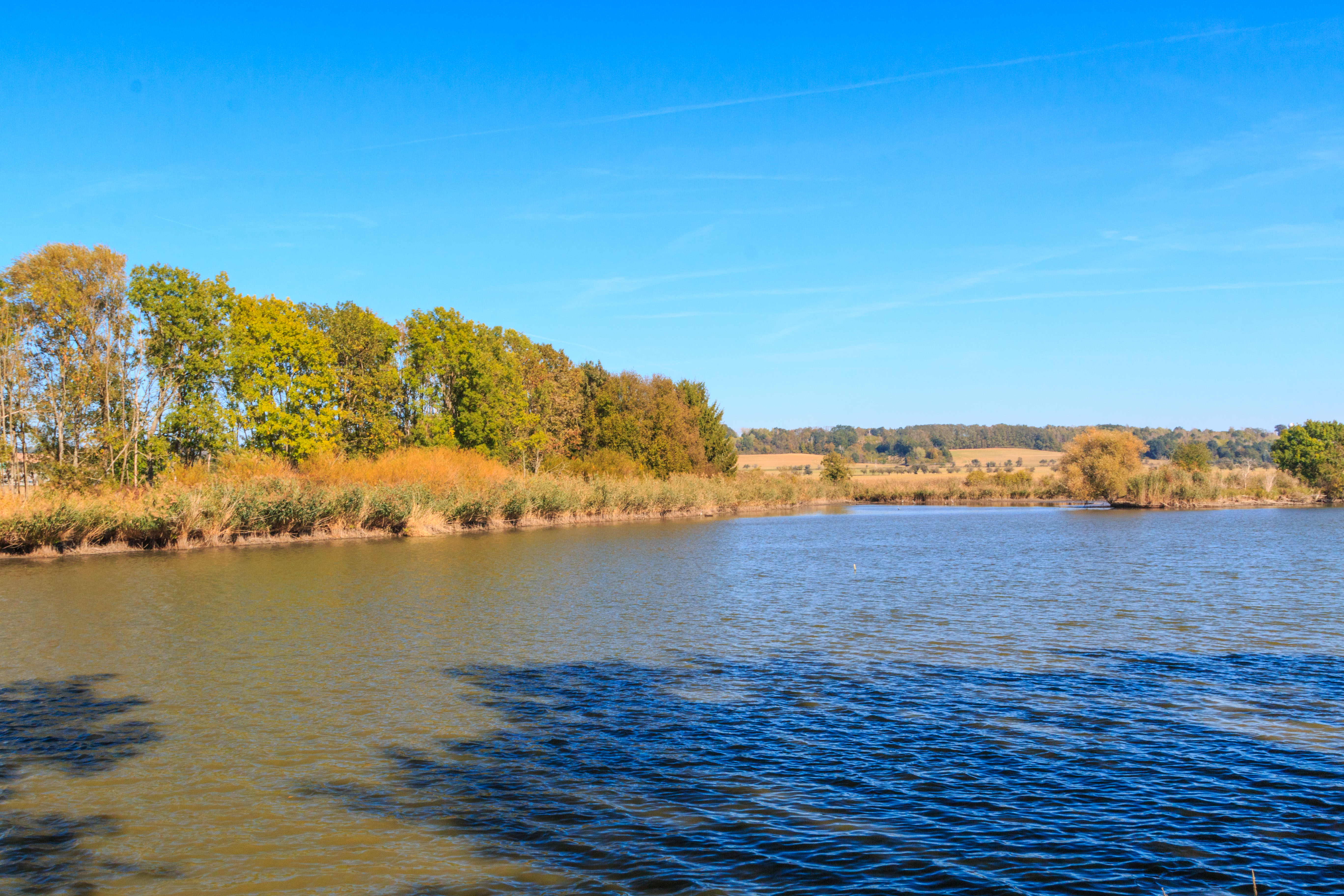 Nový rybník u Kněžmostu Project: Vodstvo.